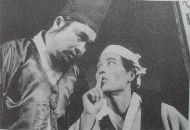 中文（中国大陆）: 韩国早期电影《出嫁的日子》